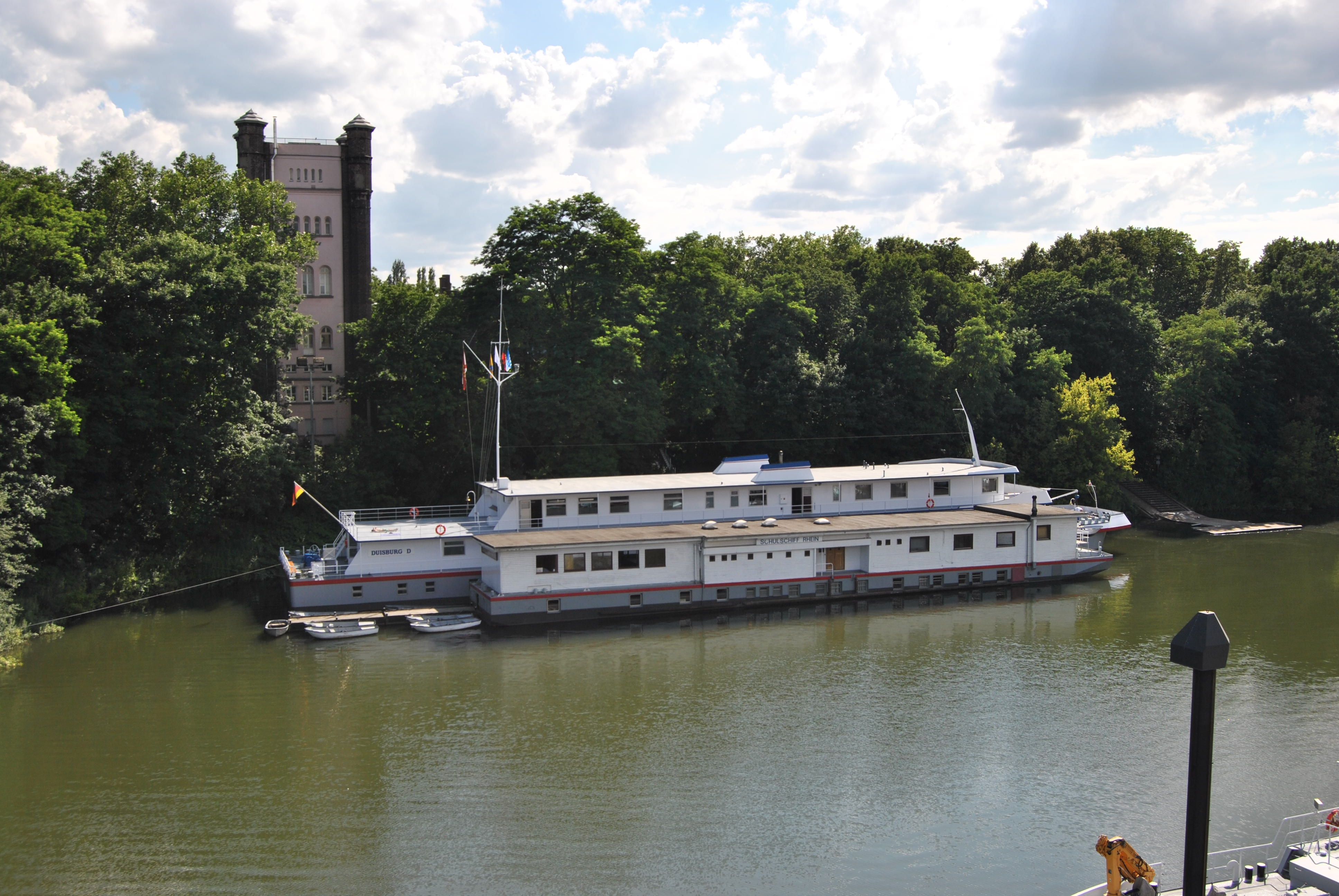 This photograph was taken with a Nikon D3000. Schulschiff Rhein bei Duisburg-Homberg